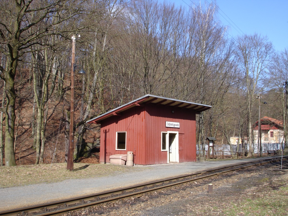 Haltepunkt Lößnitzgrund der Lößnitzgrundbahn